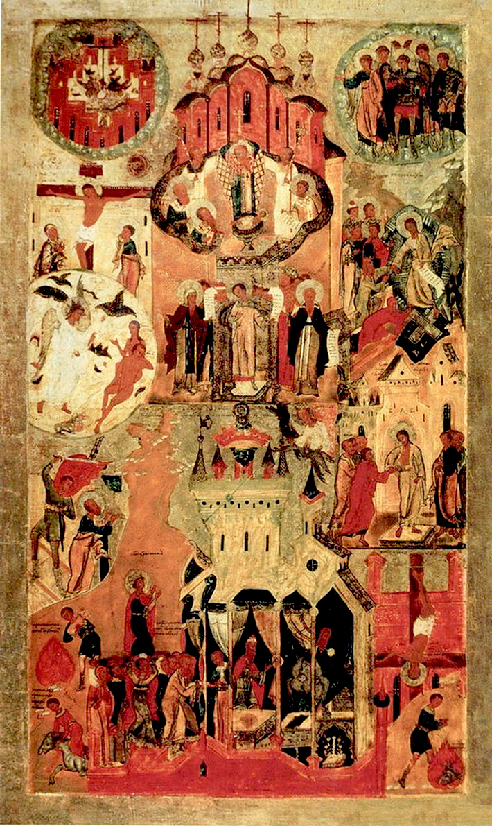 икона "Обновление храма Воскресения Христова и Похвала Богородице"